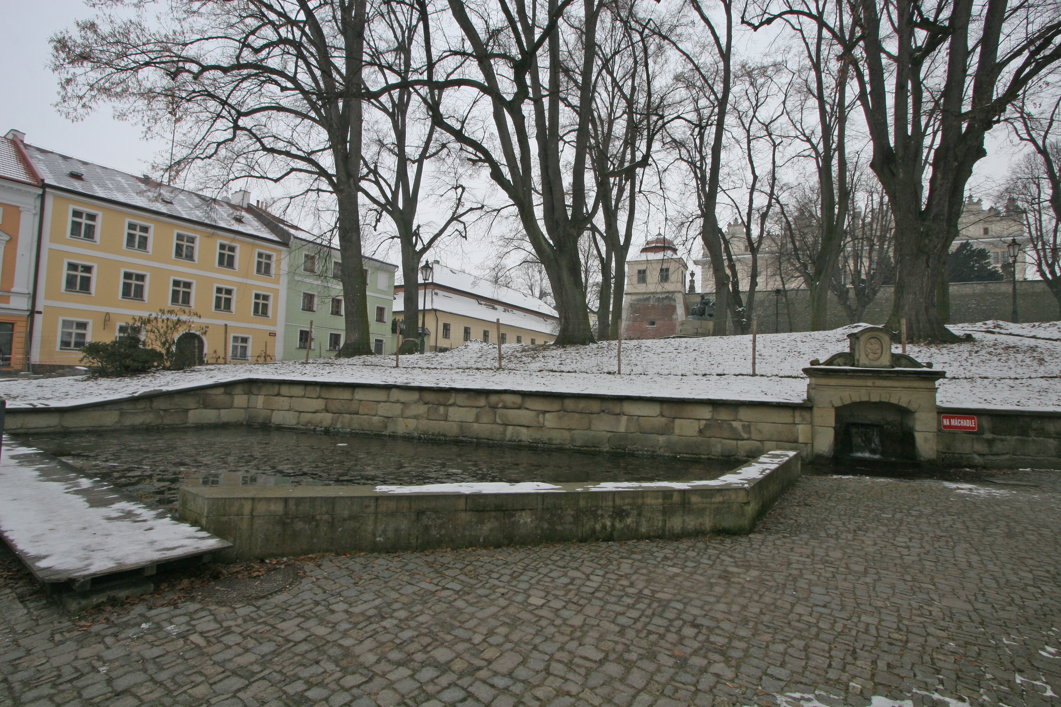 Litomyšl Mariánská ulice Na Máchadle